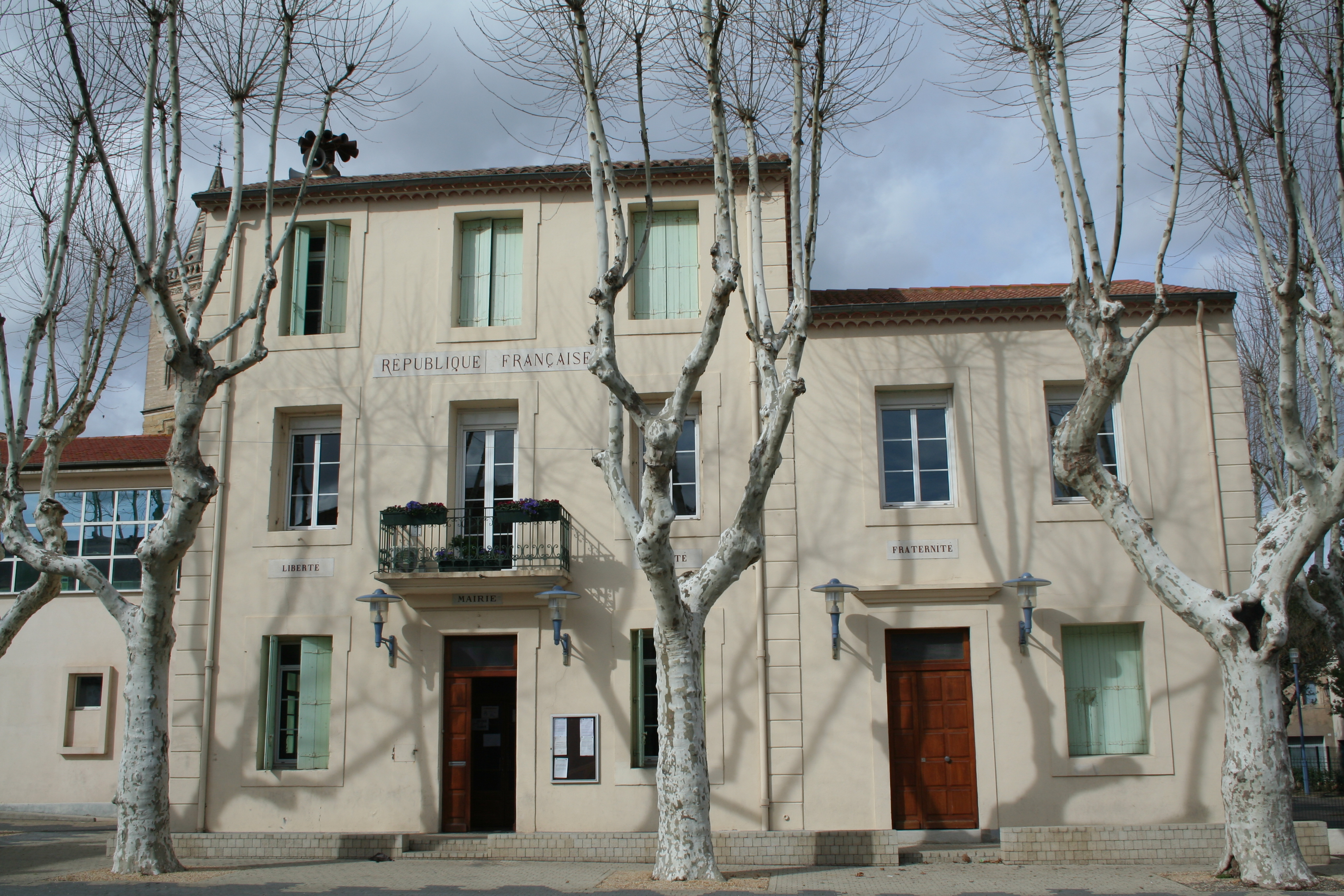 Saint-Thibéry (Hérault) - Mairie.